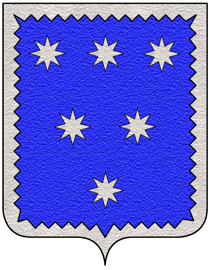 Stemma della famiglia Altieri